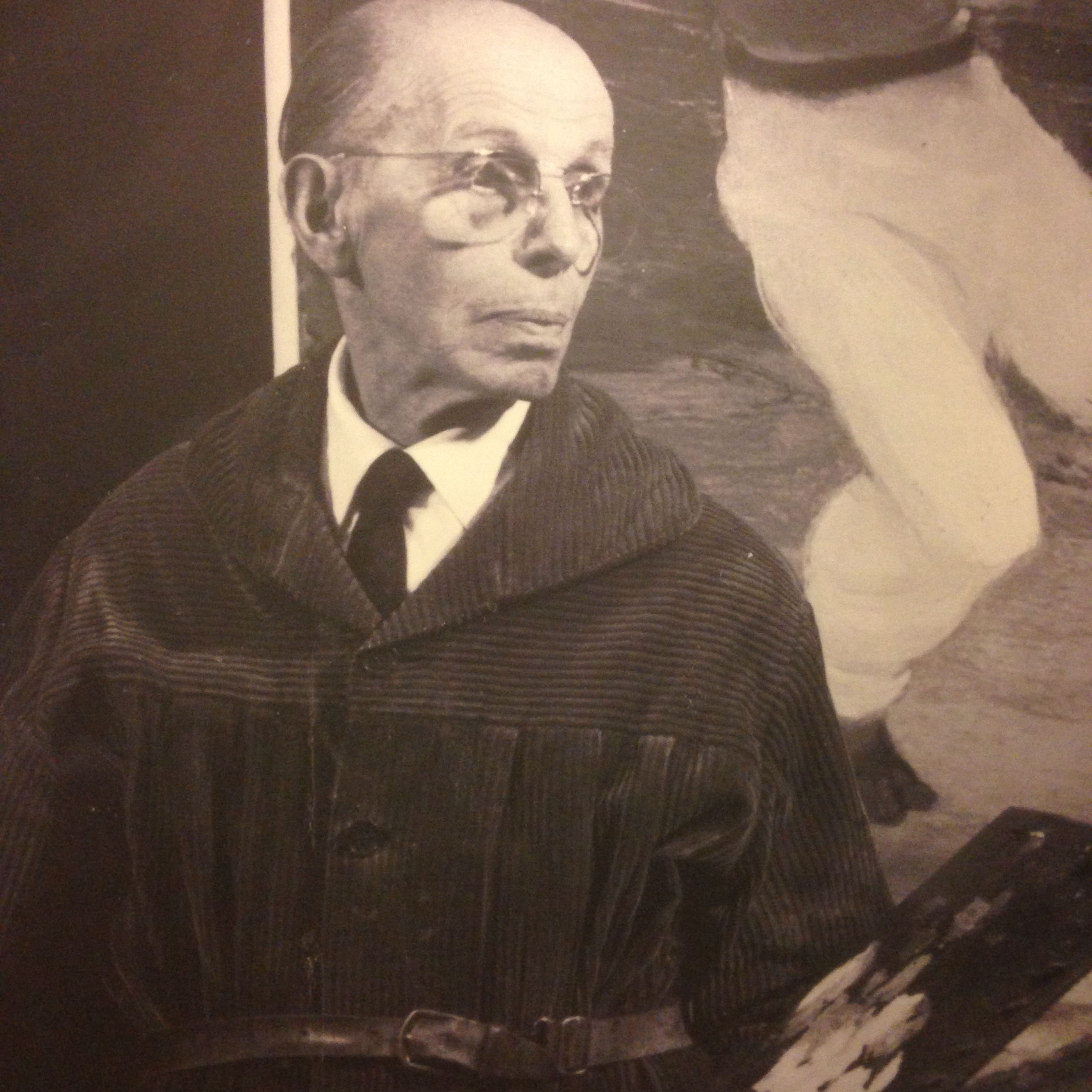 Amedeo Bocchi